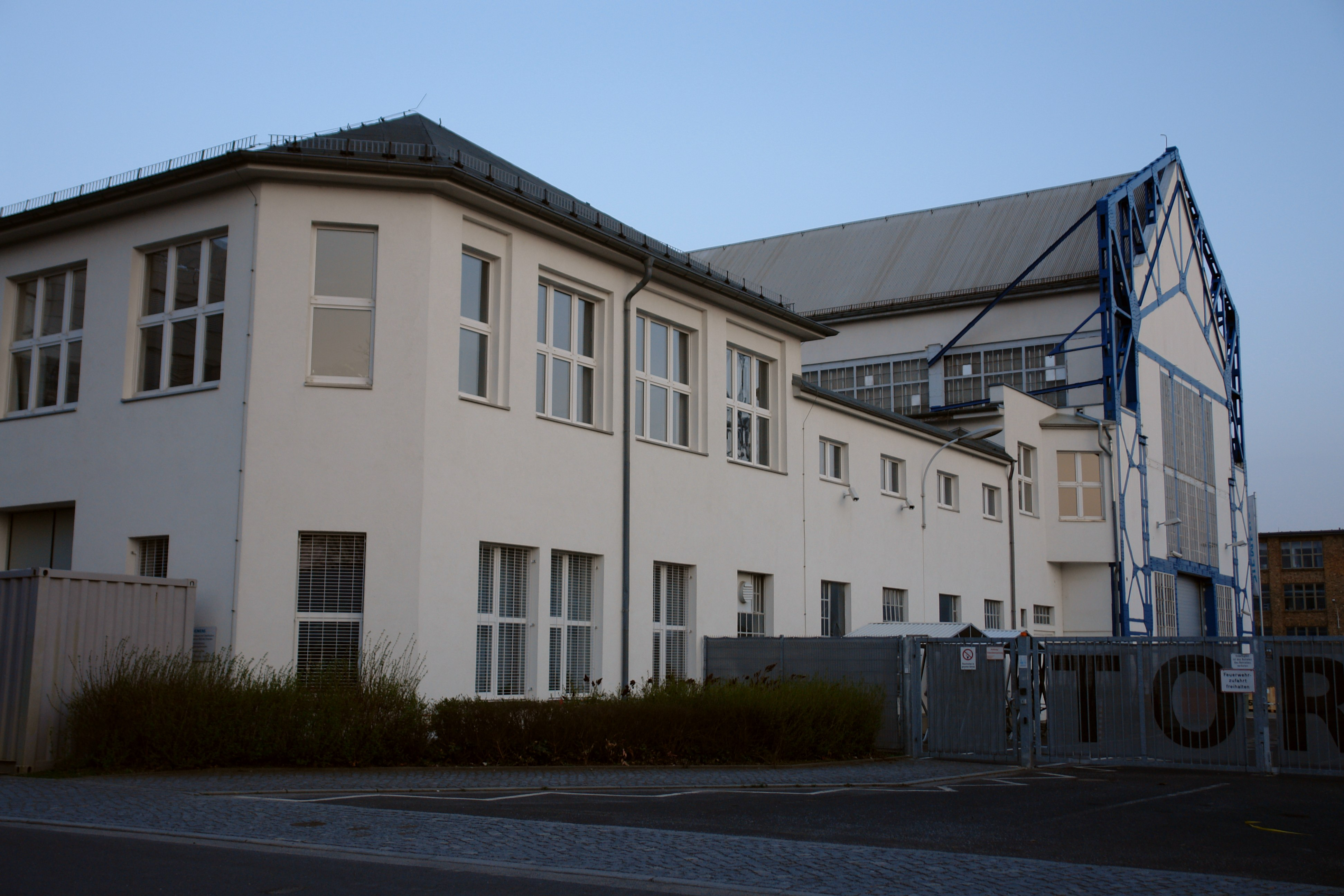 Fabrikanlage der ehemaligen Firma Koch & Sterzel in Dresden-Übigau, Washingtonstraße; rechts die Rückseite der Fabrikhalle, links der zweigeschossige Bürotrakt